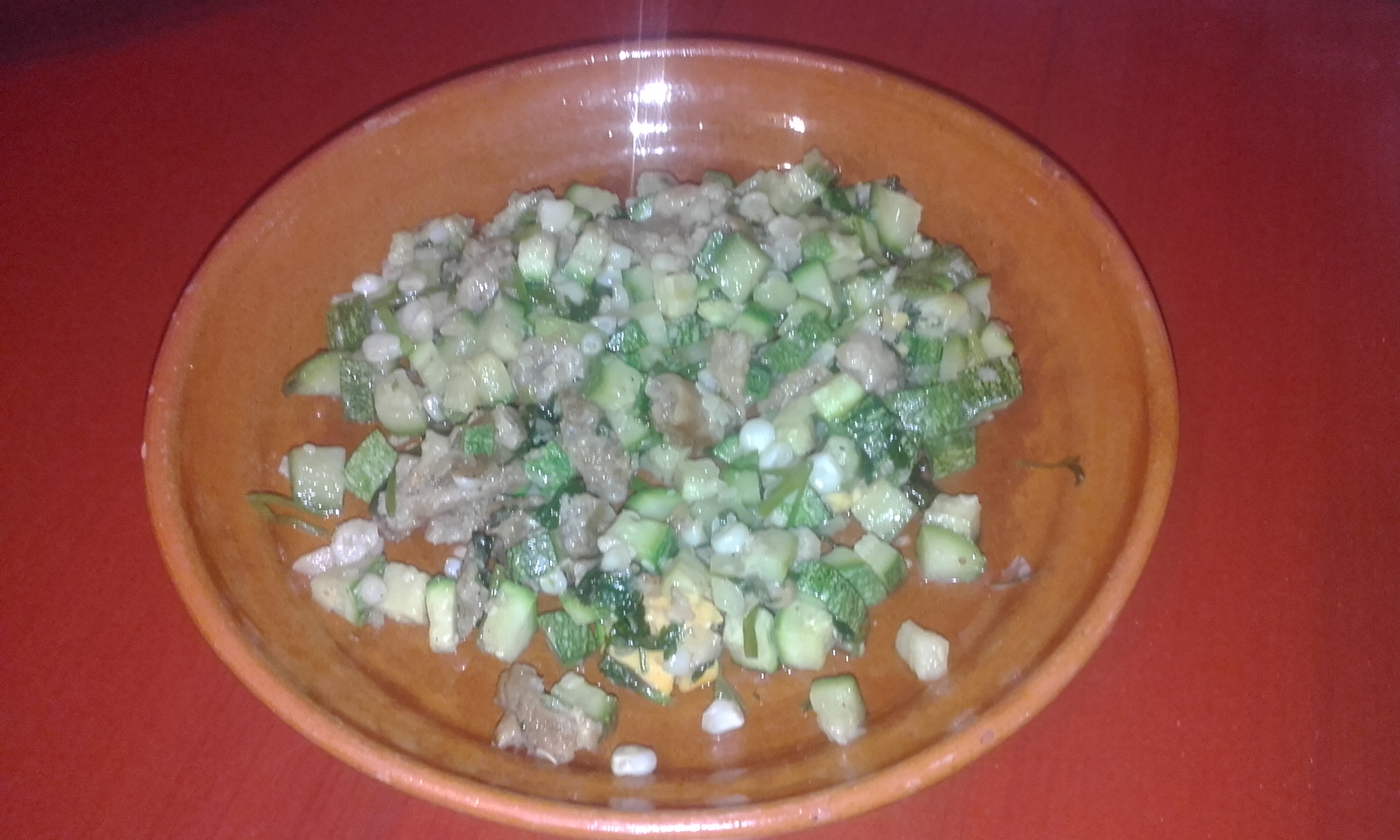 Picadillo de Calabaza de Zacatelco, Tlaxcala